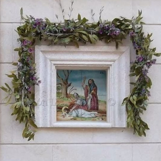 La Estación IX: Es una de las estaciones de la Pasión, (también llamado Paso) que recorre algunas calles del centro histórico de Castalla. FR: La "Estación IX" est située dans le centre historique et dans une des rues d’accès au château de Castalla (province d’Alicante), c'est la neuvième station du chemin de croix dont le pèlerinage se célèbre chaque Semaine Sainte. UK: Located in the historic center on a road leading to the castle of Castalla (in the province of Alicante), it is the ninth place on the “Route of the Cross” a pilgrimage which takes place every Easter.